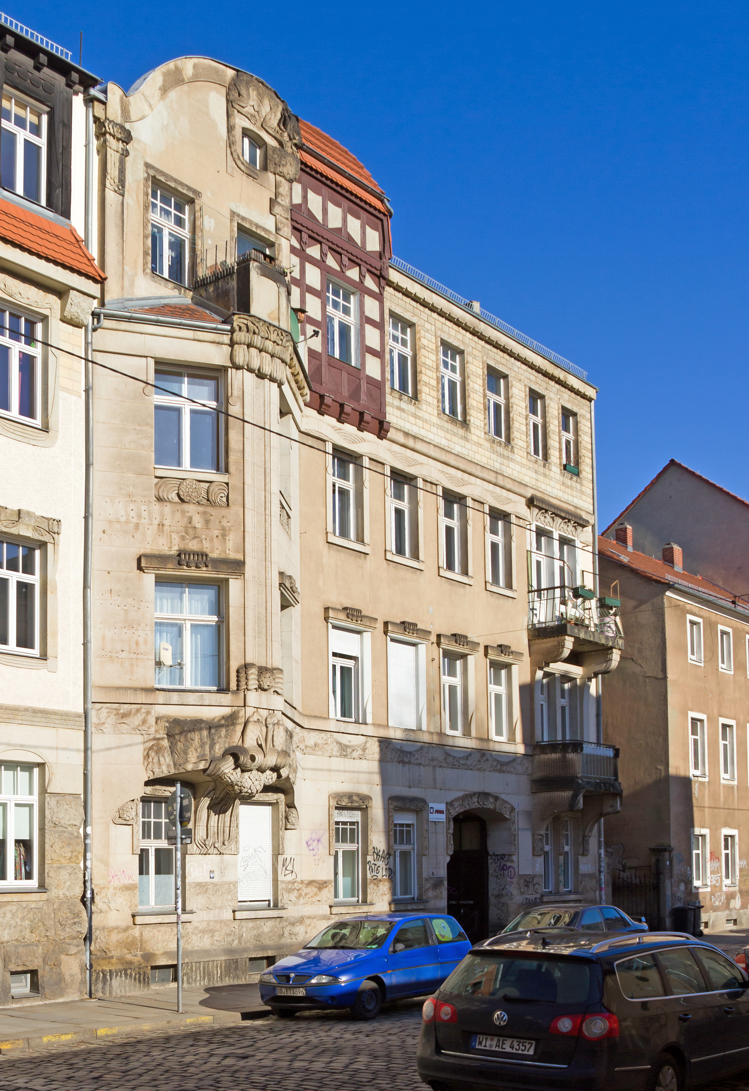 Katharinenstraße5 schräg